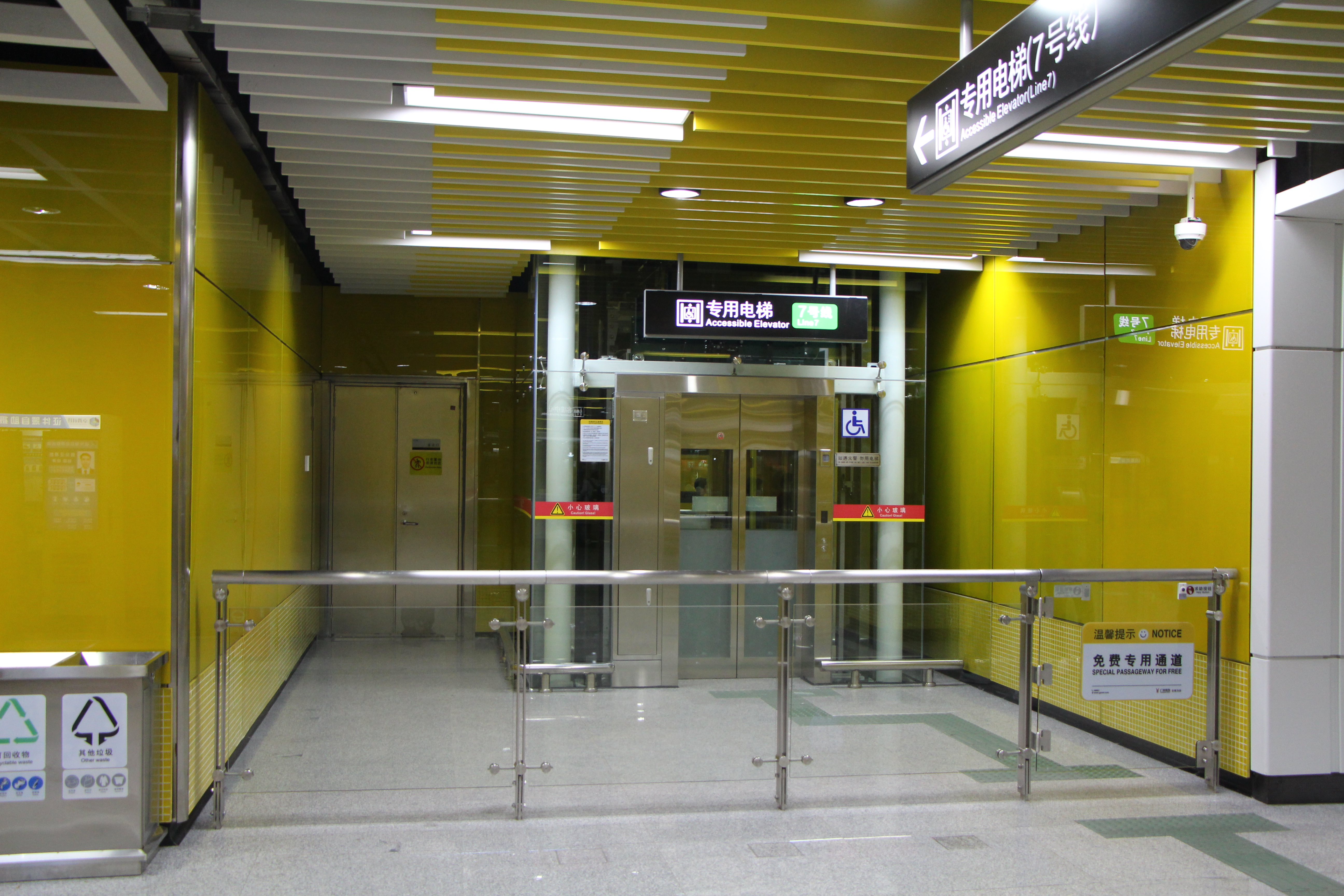 广州地铁大学城南站